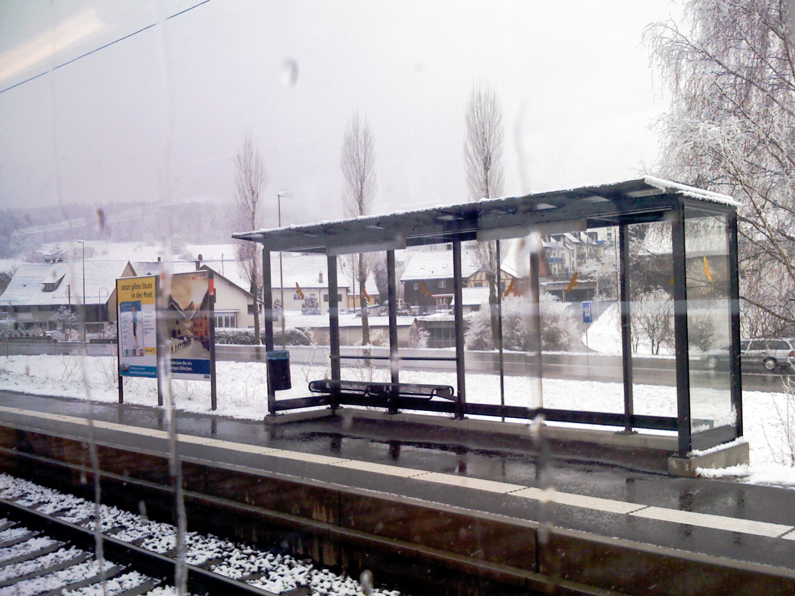 Schottikon station, Canton Zurich, Switzerland - Schottikon stacidomo, Kantono Zuriko, Svislando